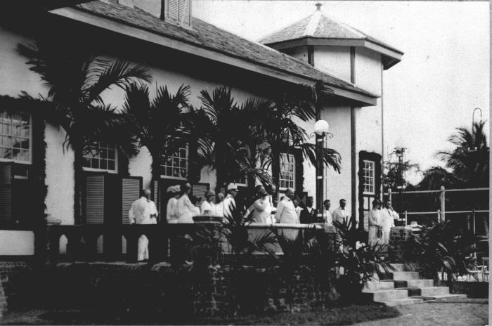 Foto. Ter herinnering aan het bezoek van Zijne Excellentie den Gouverneur-Generaal van Nederlandsch-Indië Mr. D. Fock aan de residentie Zuider- en Oosterafdeeling van Borneo (April 1924). Ontvangst op het eiland Tarakan van de Gouverneur-Generaal van Nederlands Oost-Indië tijdens zijn rondreis door de Zuider- en Oosterafdeling van Borneo